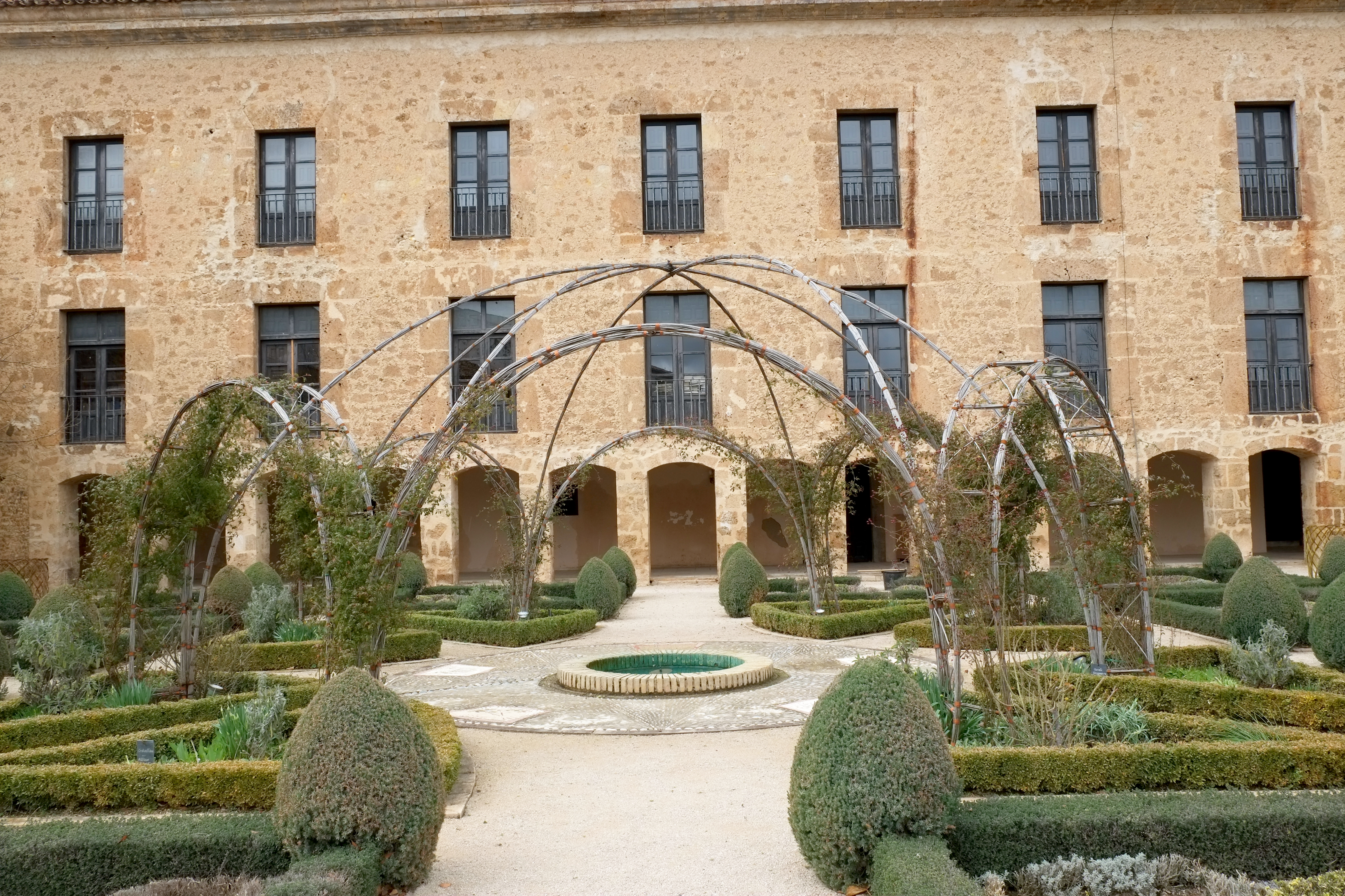 Palacio de los Castejones in Ágreda in der Provinz Soria (Spanien)